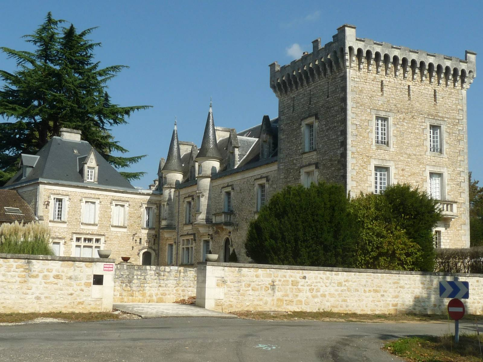 château de La Couronne à Marthon (16), France